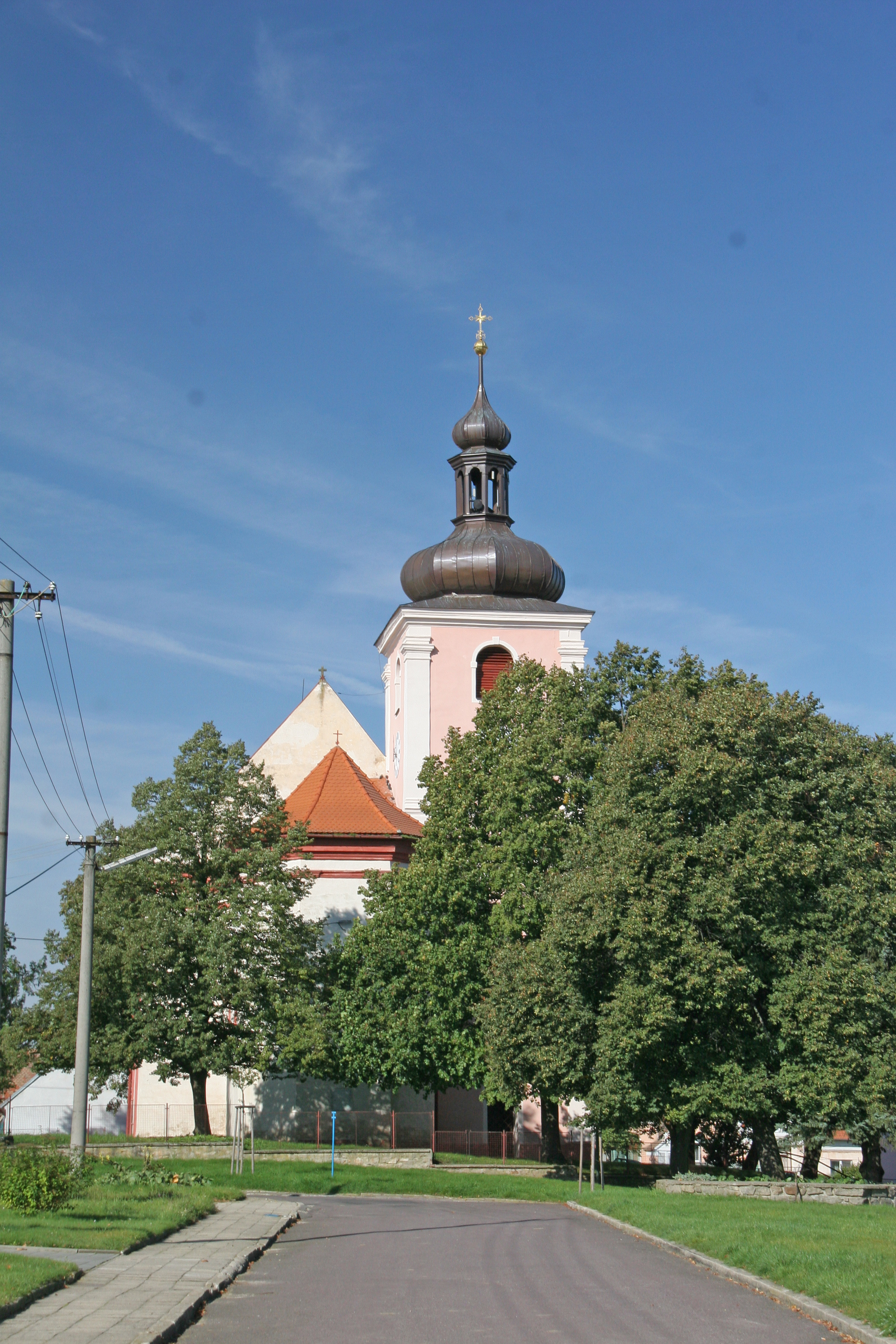 Kostel svatého Jana Křtitele, Mašovice.